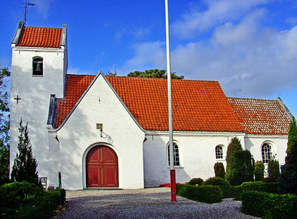 fra syd